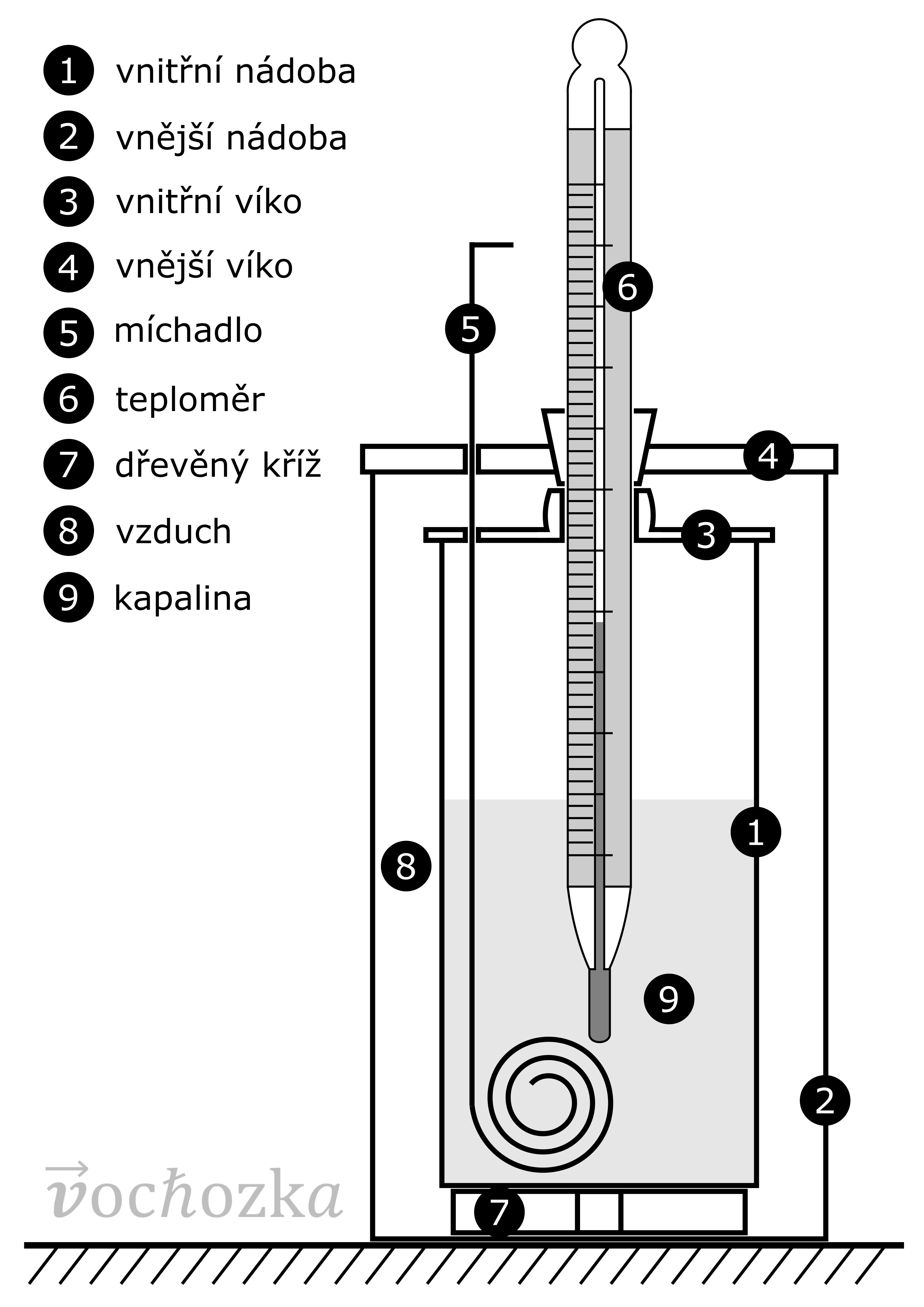 schéma směšovacího kalorimetru